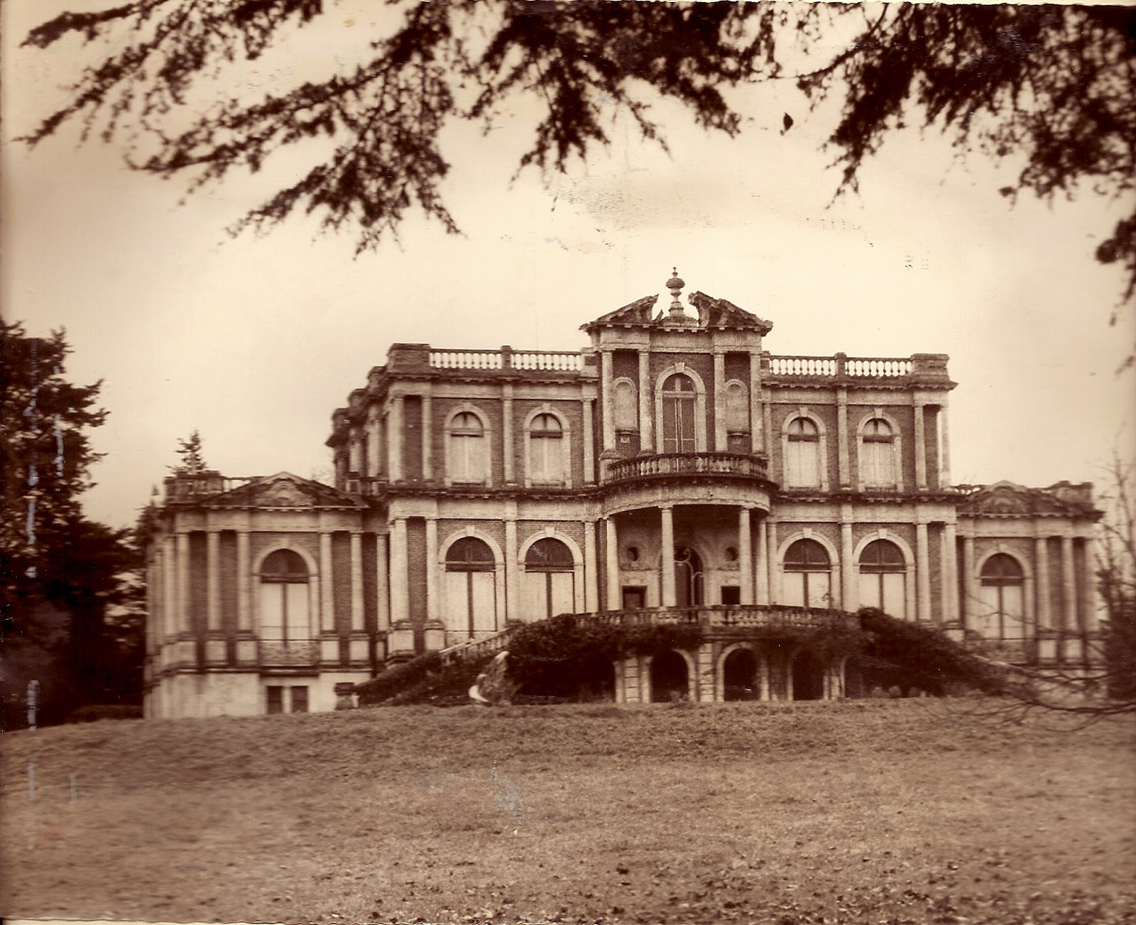 propriété du ministre plénipotentiaire François de Vial